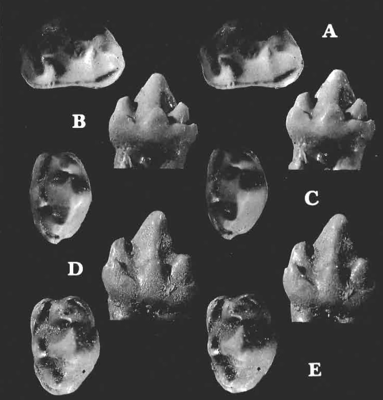 Woutersia mirabilis Sigogneau-Russell 1983, the quany of Saint-Nicolas-deport, France, ?early Rhaetian. CIA. Right upper molar SNP 52W in occlusal view (anterior left). OB-C. Lower right molar RAS 975 in lingual (B) and occlusal (C, anterior top) views. OD-E. Lower right molar RAS 706 in lingual (Dl and occlusal (E, anterior top) views. Stereophotos D. Serrette, URA 12 CNRS. All x 20.